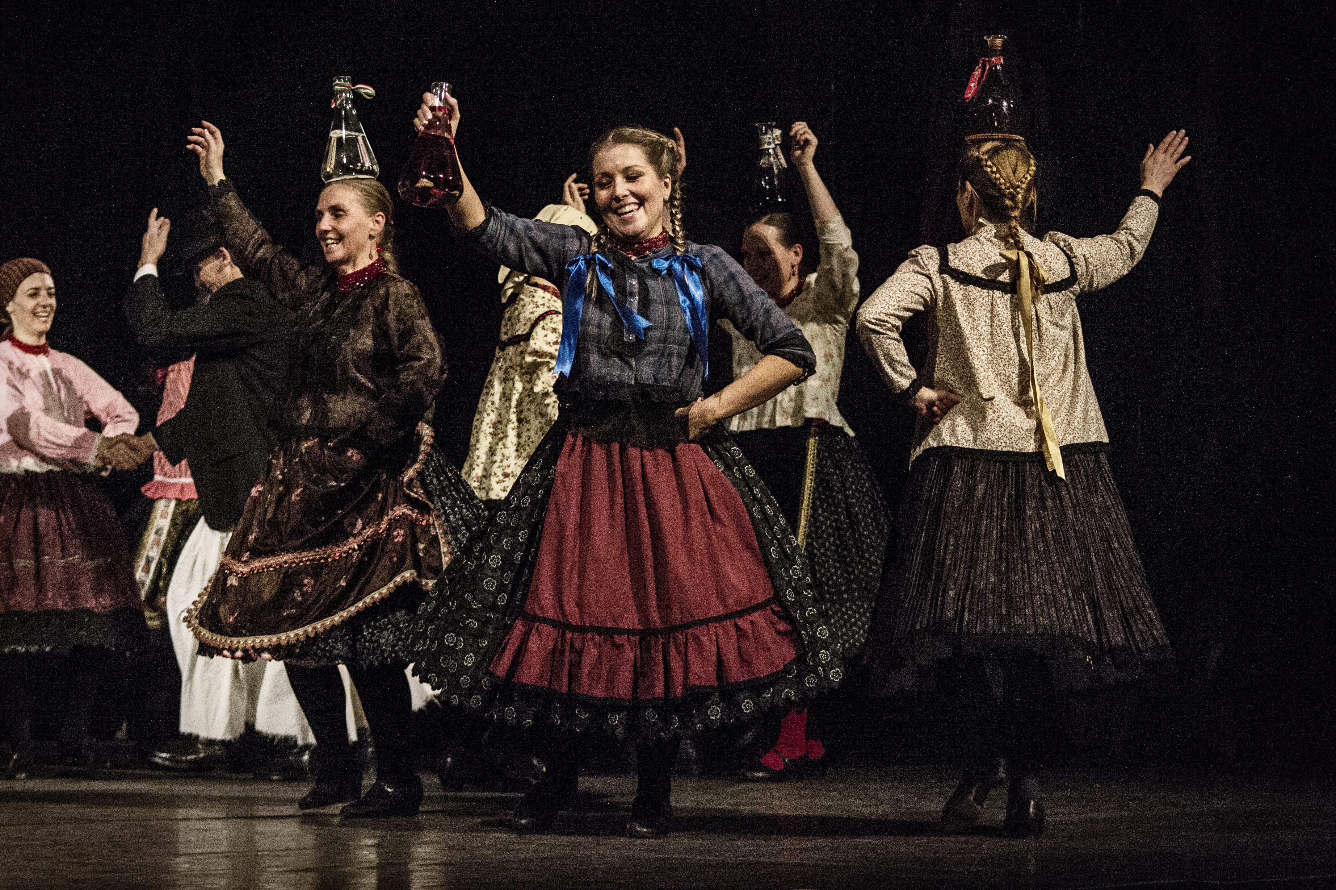 Tükörcserepek - Tiszai Zsuzsa és Lovas Bálint 20 éves jubileumi műsora a Debreceni Csokonai Nemzeti Színházban 2014